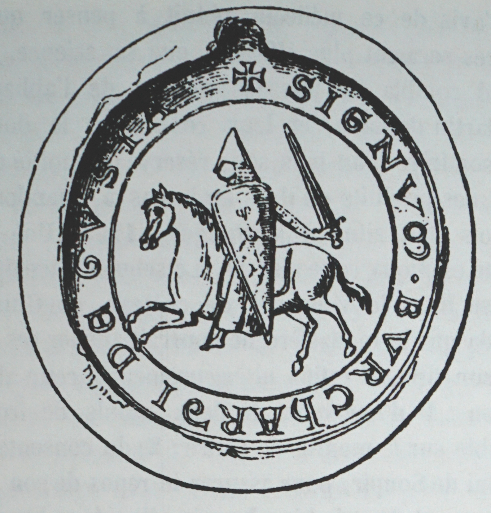 sceau de Bouchard de Guise archives départemntales de l'aisne h 929.